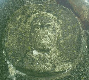 Medaillon von Friedrich Dewischeit am Gedenkstein in Gizycko (Lötzen)